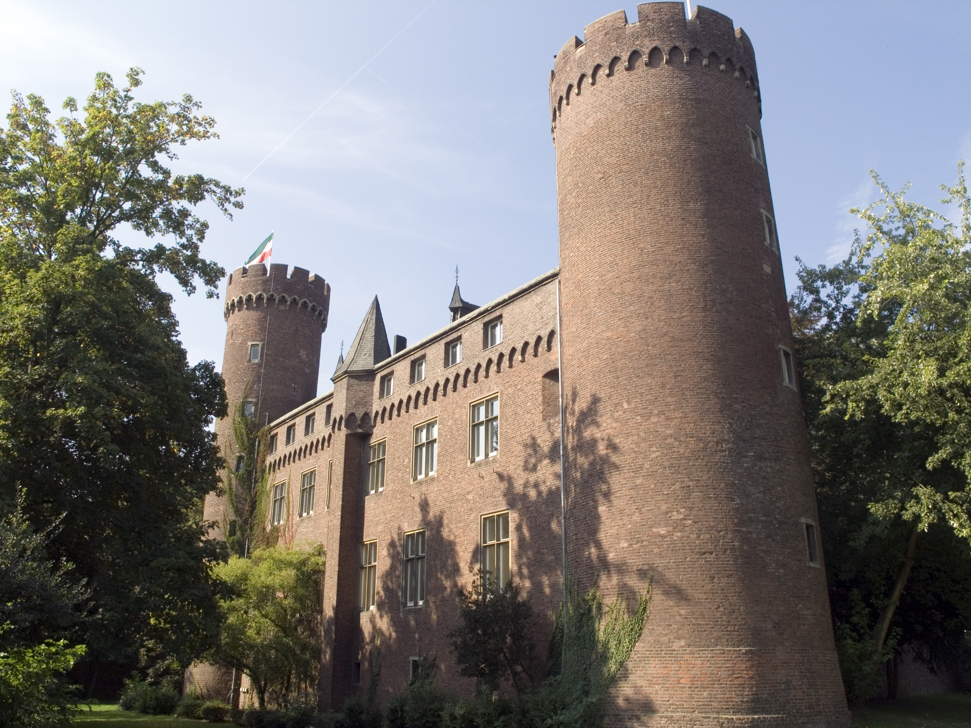 Südost-Flügel der Burg Kempen